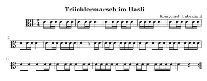 "Triichlermarsch im Hasli", Komponist Unbekannt